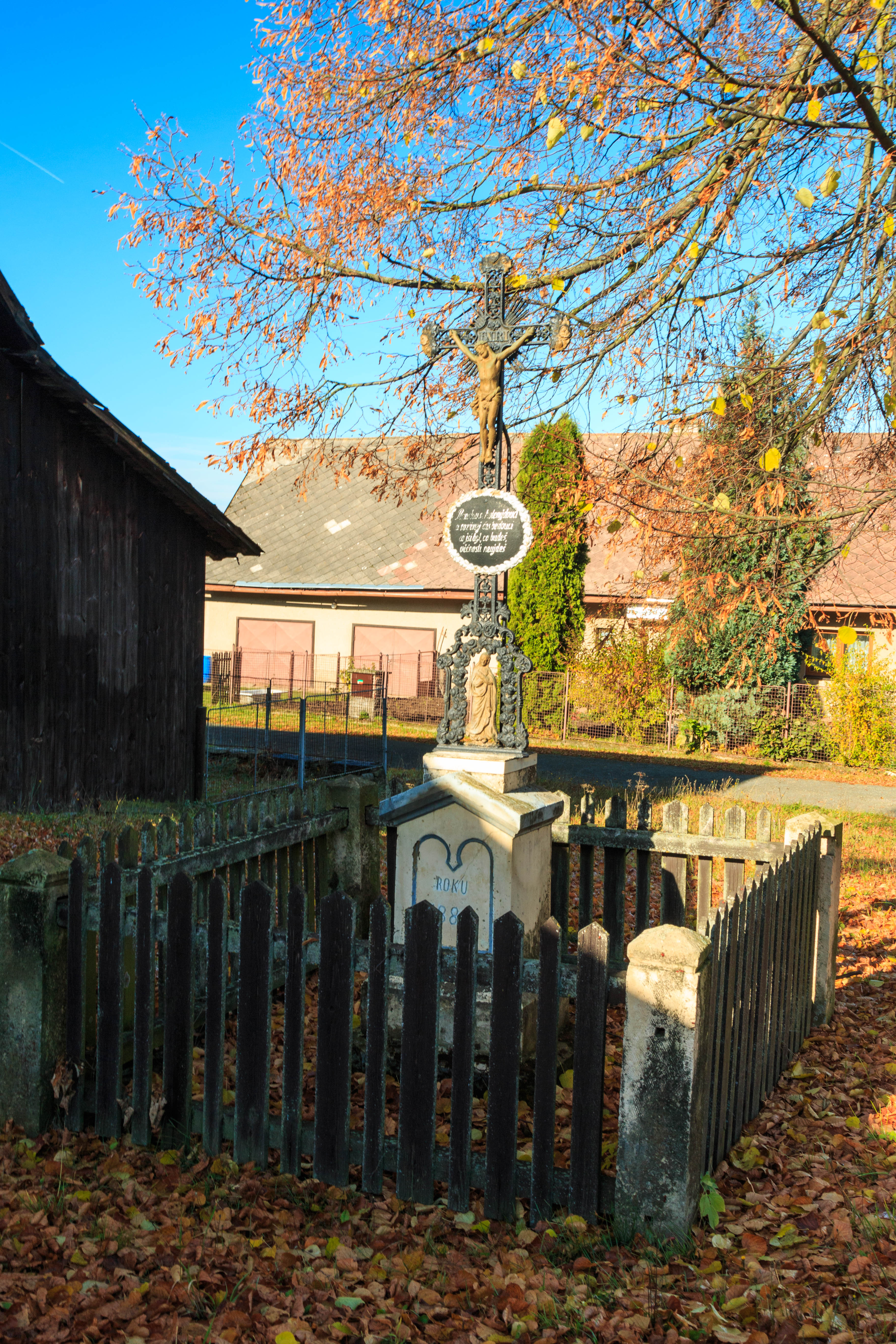 Dolní Vestec křížek